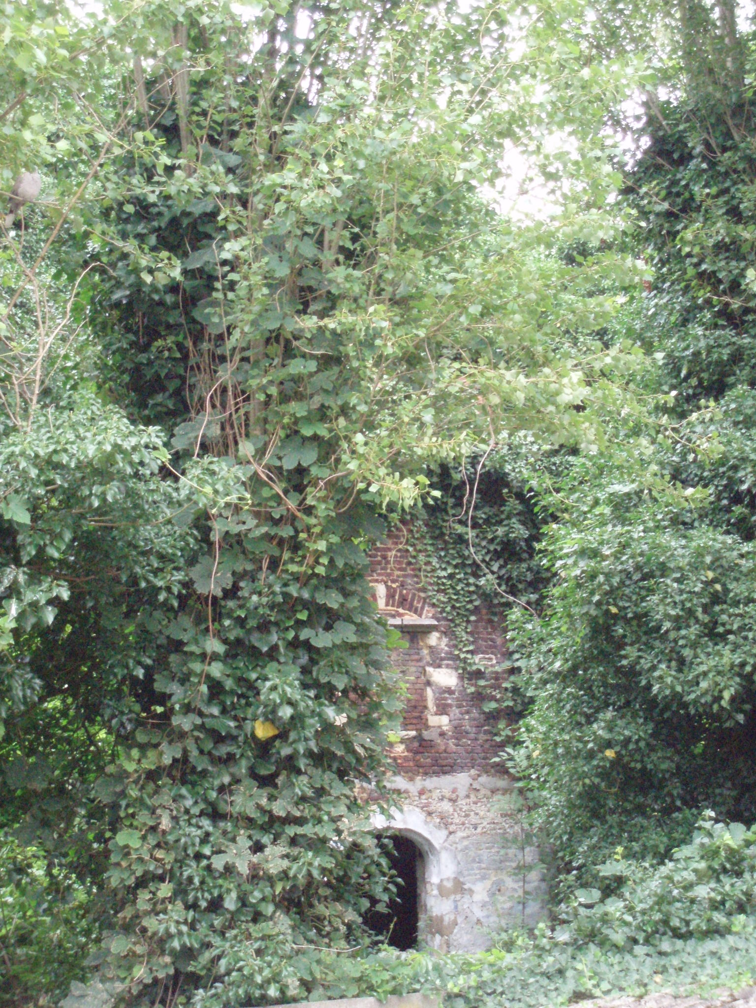 Spaans Toreken, Niel (Belgium)